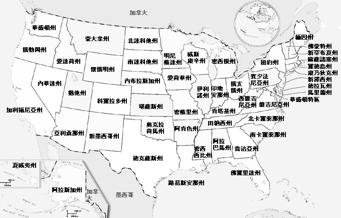 美國州別的地圖, 有中文, Prattflora製作。